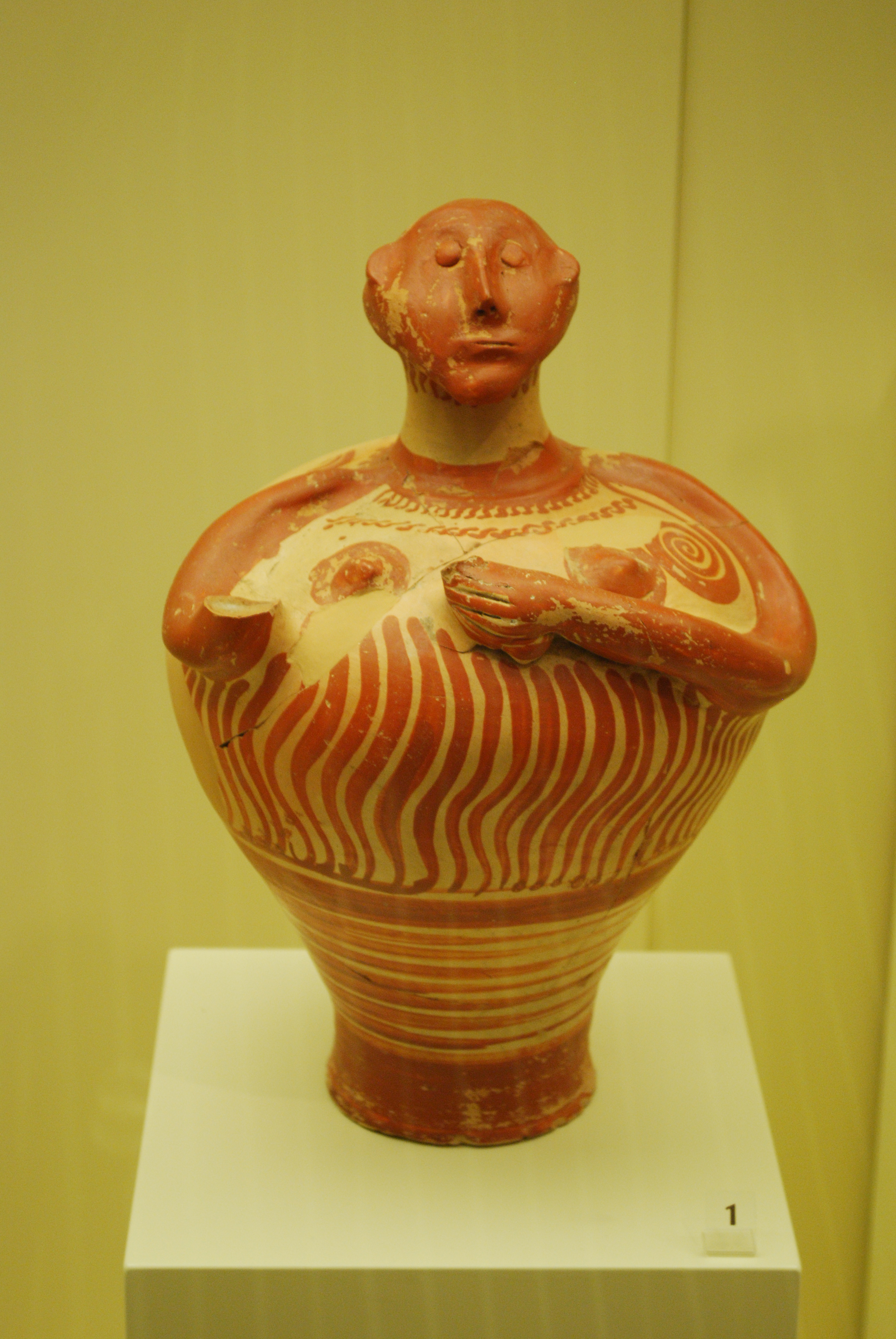 Idole mycénienne en terre cuite peinte.